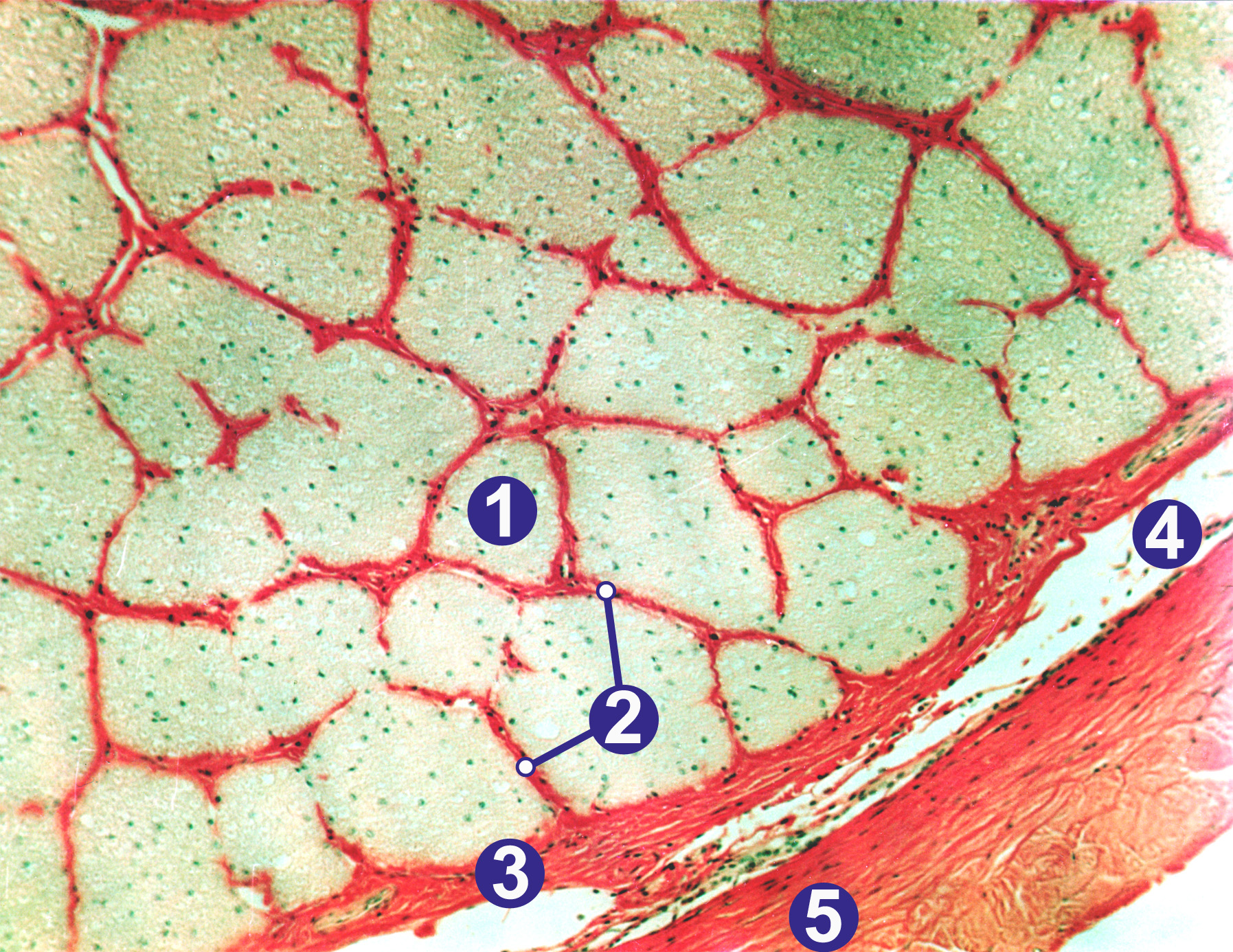 Querschnitt durch den Sehnerv (N. opticus) einer Ratte. Färbung nach van Gieson, Objektiv 120x: (1) Nervenfaserbündel, (2) Perineurium, (3) Epineurium (Pia mater), (4) Arachnoidea mit Liquorspalt, (5) Dura mater